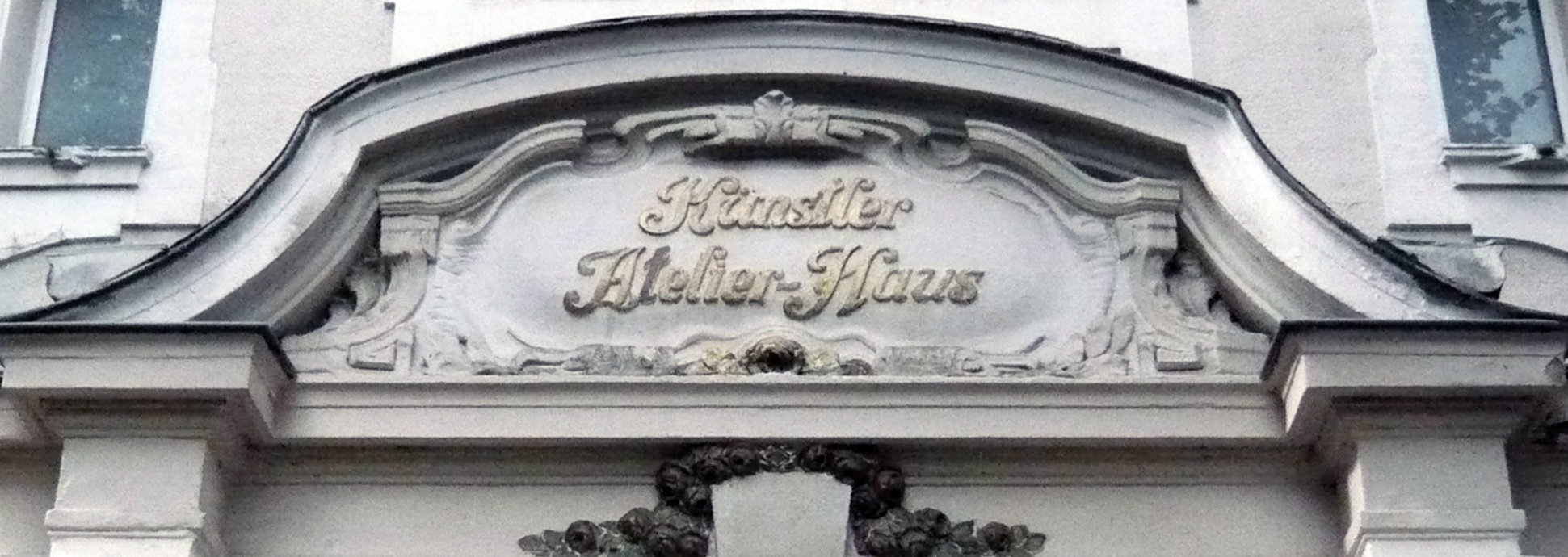 Künstler Atelier-Haus, Portal Schriftzug